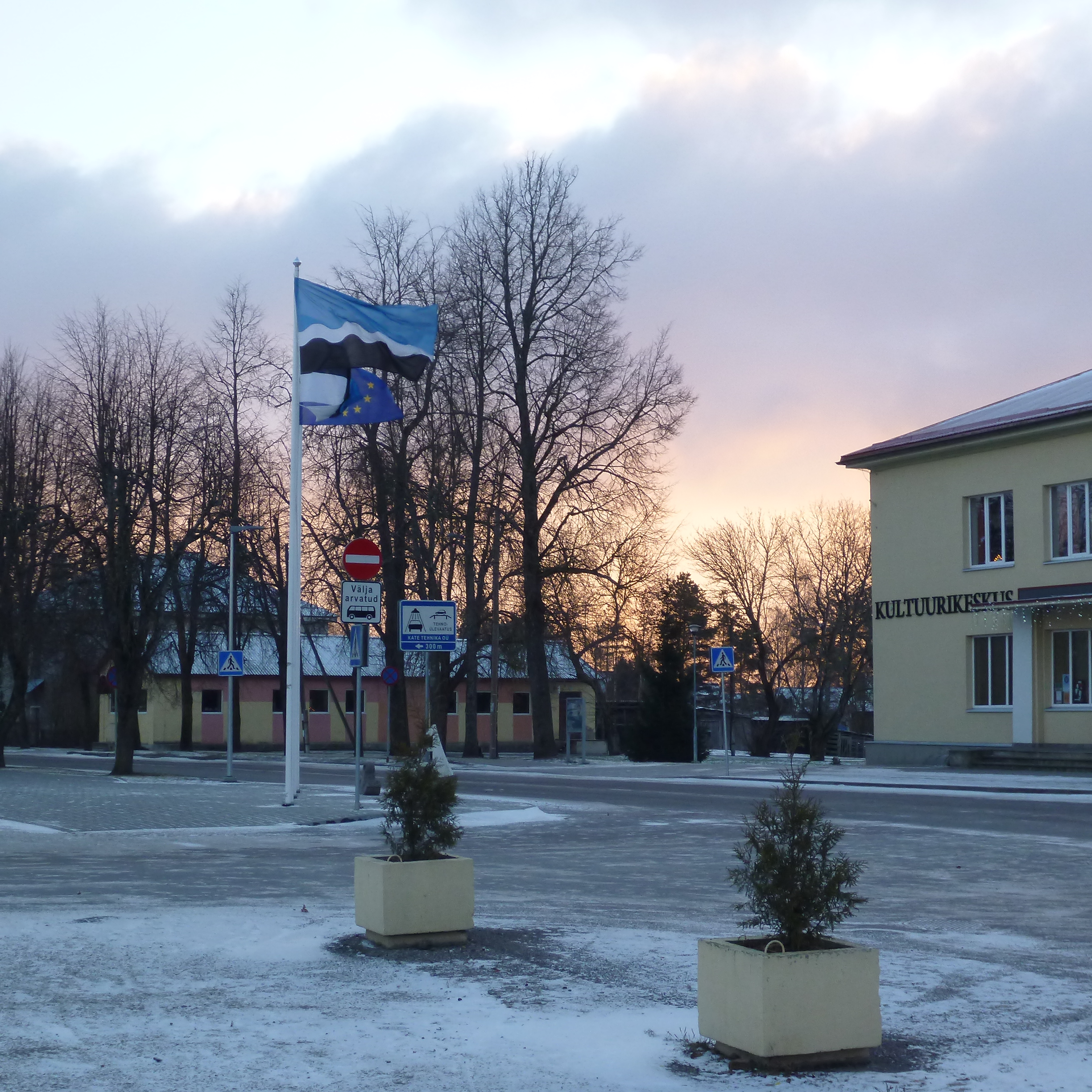 Mustveen, Viron ja EU:n liput Mustveen keskustassa.